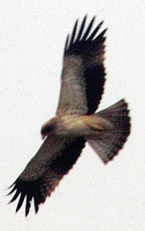 Hieraaetus pennatus, Bannerghatta, India